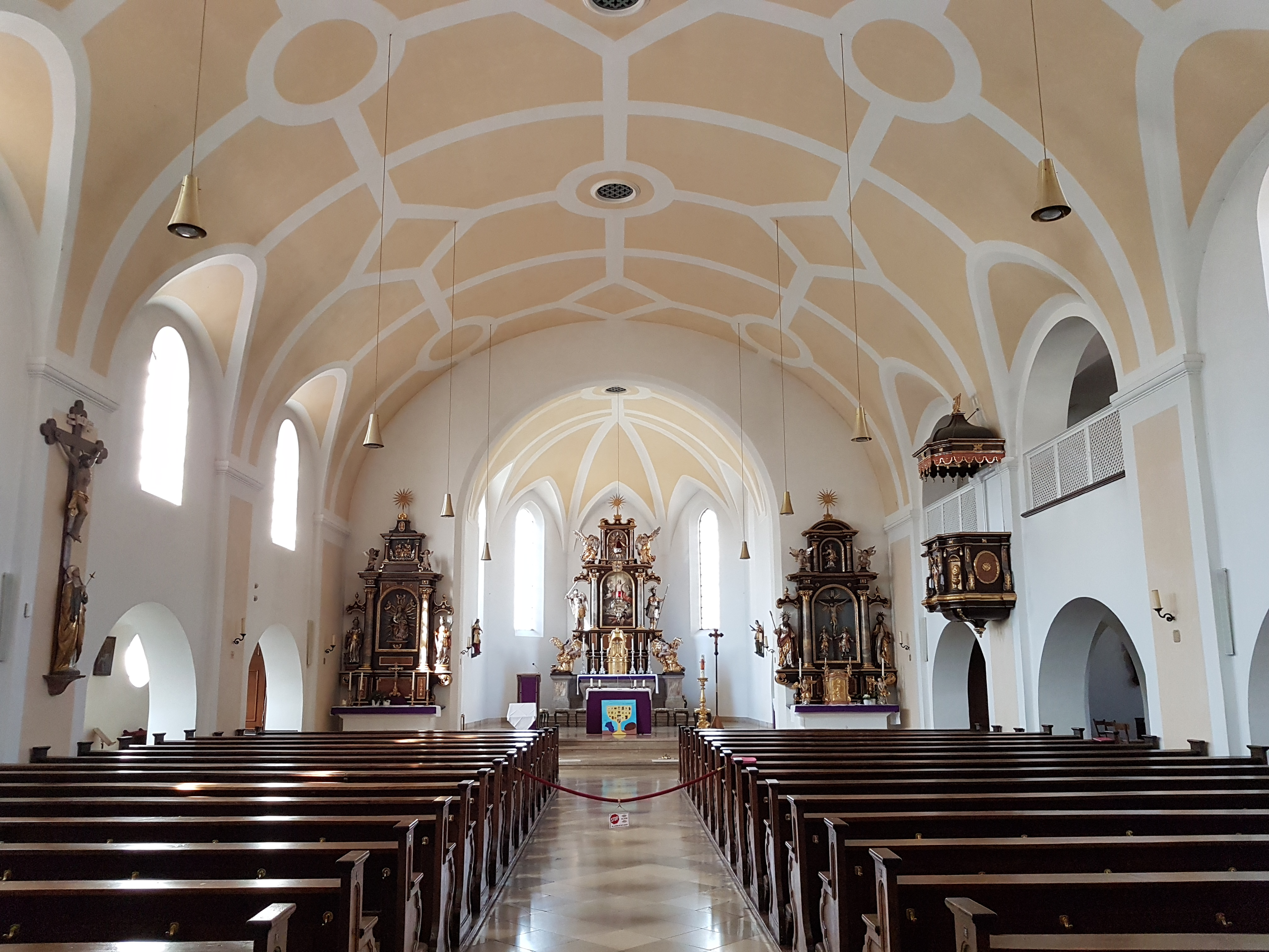 St. Jakob (Feldkirchen), Innenraum mit Blick zum Chor